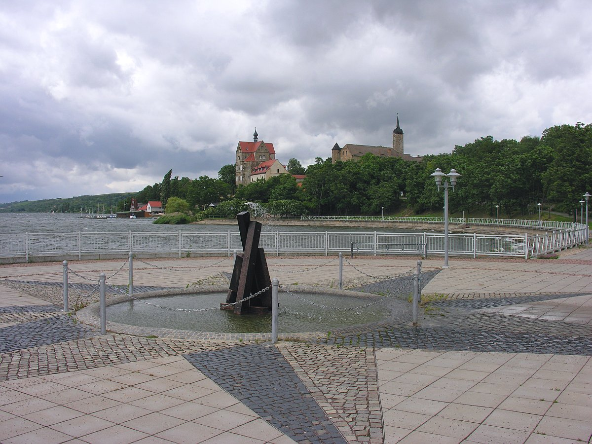 Seeburg Brunnen Uferpromenade der Süße See Mansfelder Land Foto 2007 Wolfgang Pehlemann Wiesbaden DSCN3443